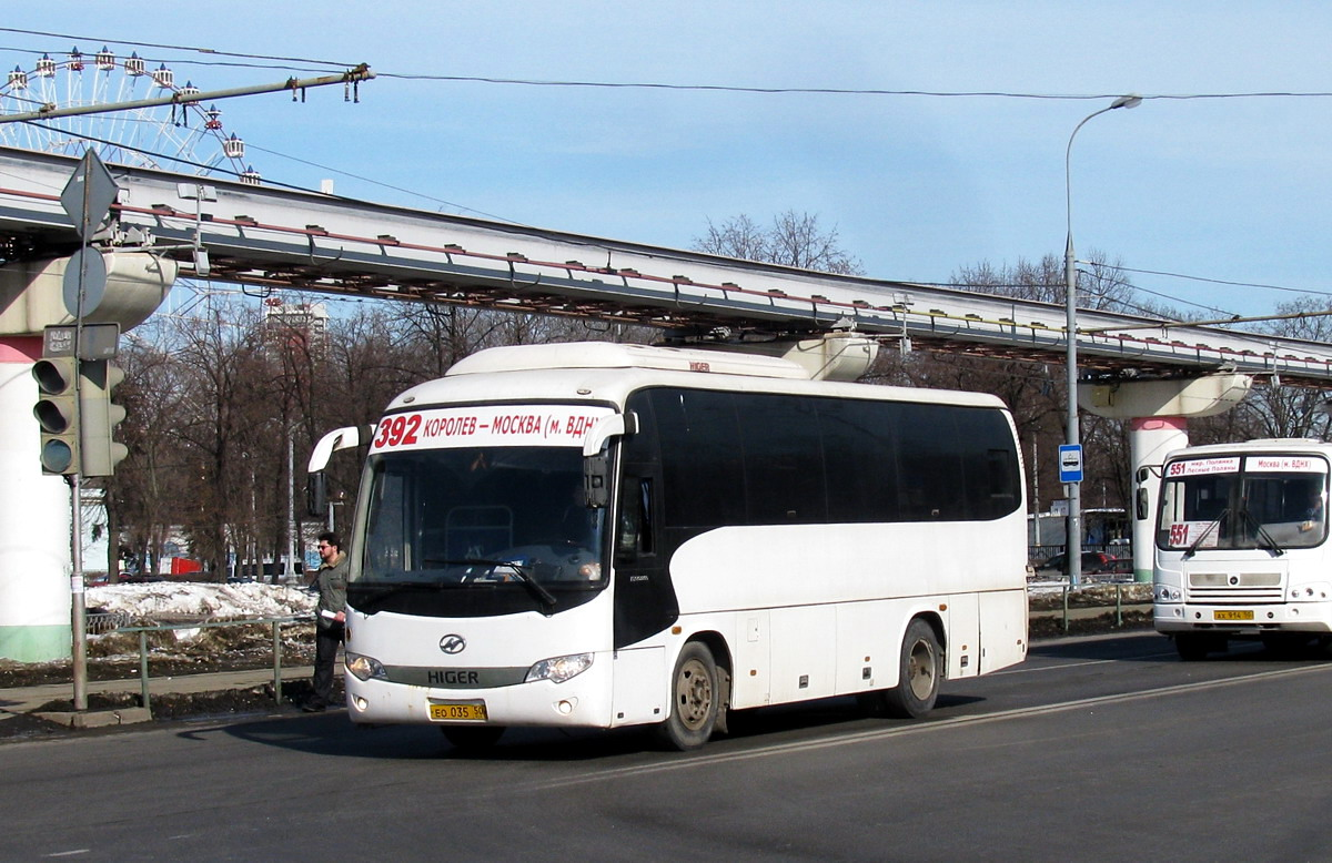 Автобус 392 возле ВДНХ